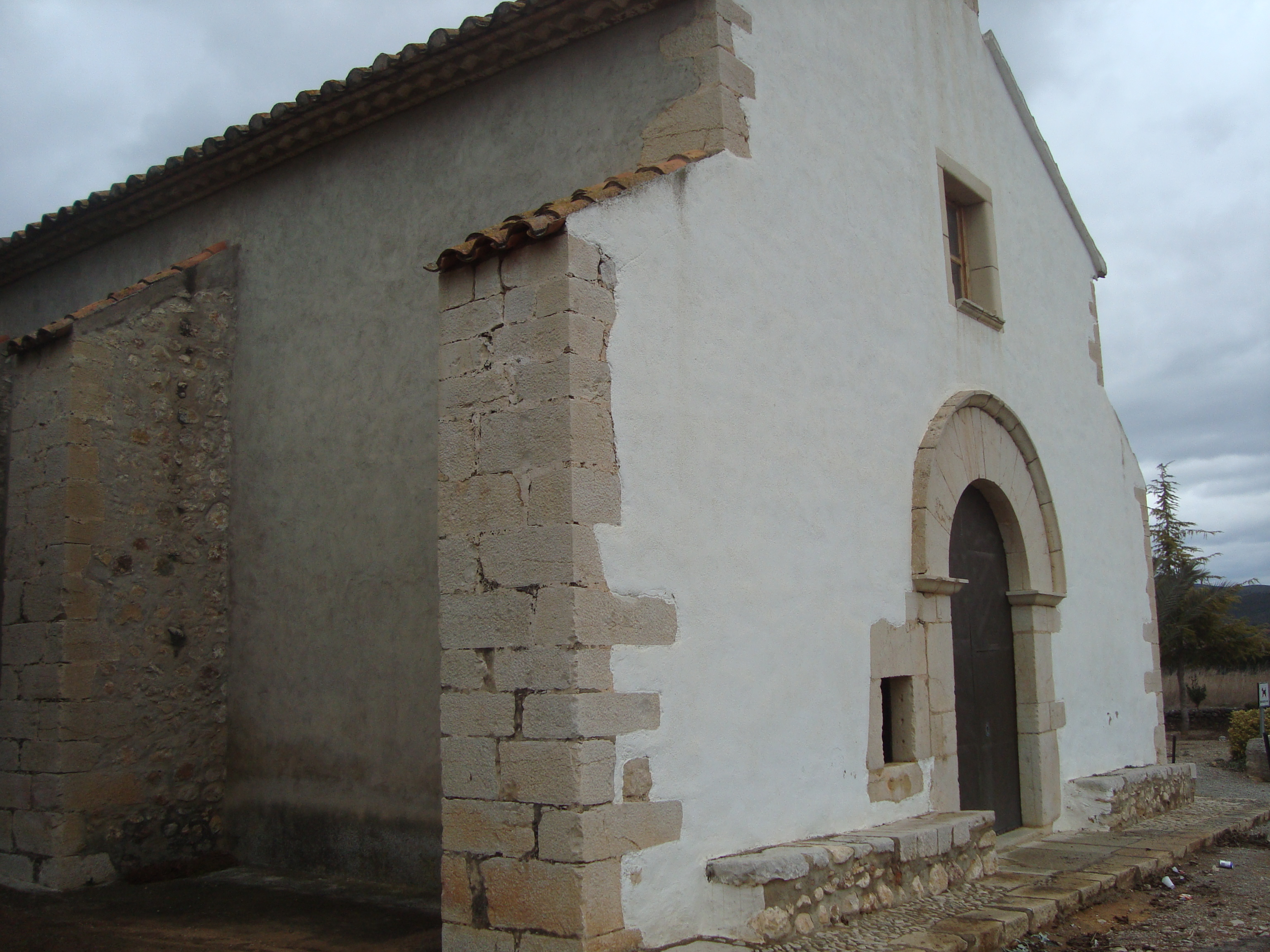 Ermita de San Vicente Ferrer de les Coves de Vinromà, CastellóN